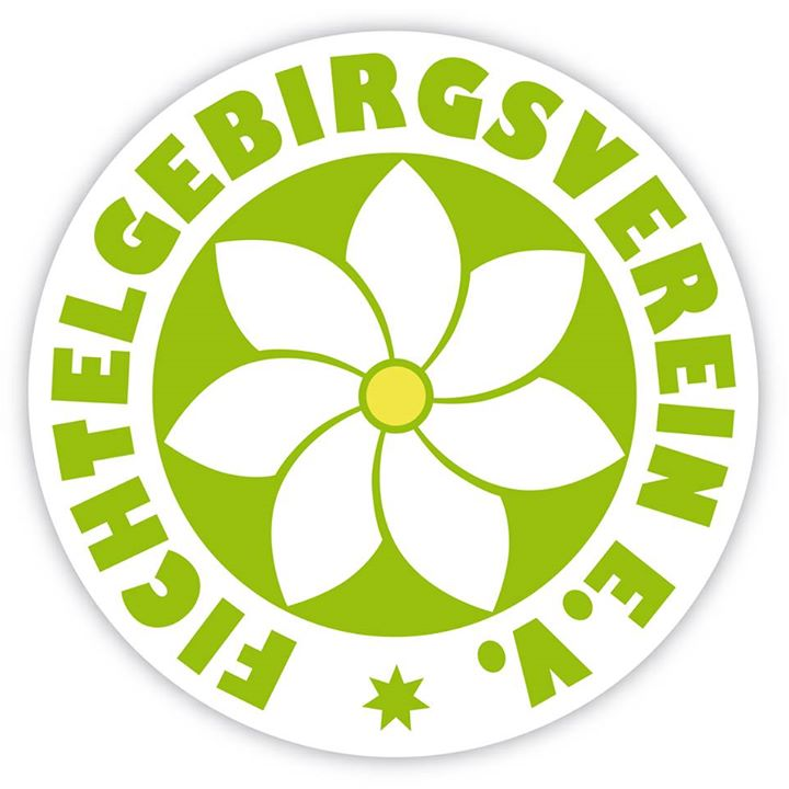 Das Logo / Symbol des Fichtelgebirgsverein ist seit 1888 der Siebenstern